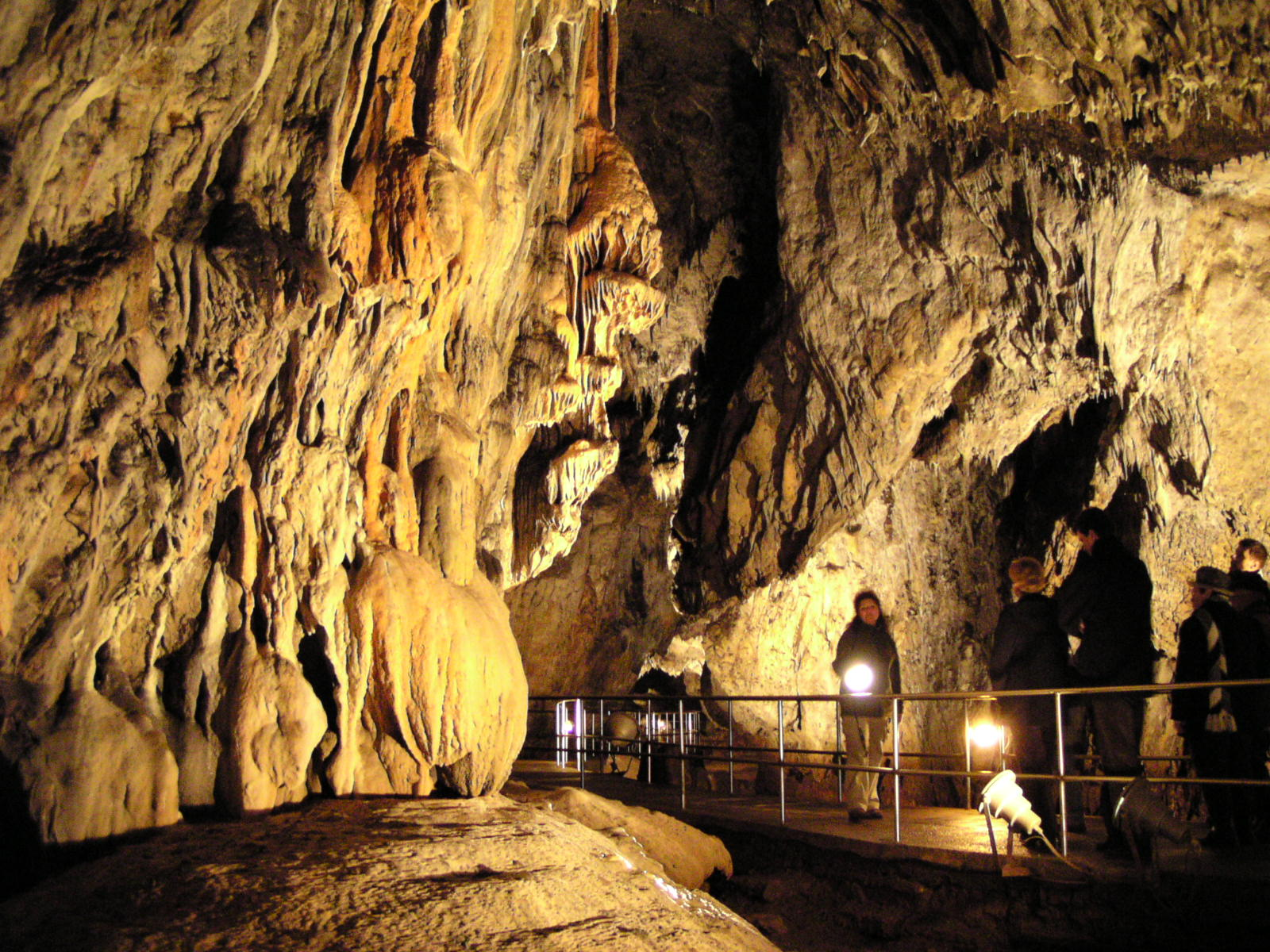 Dr. Akiyama Shingo felvetele